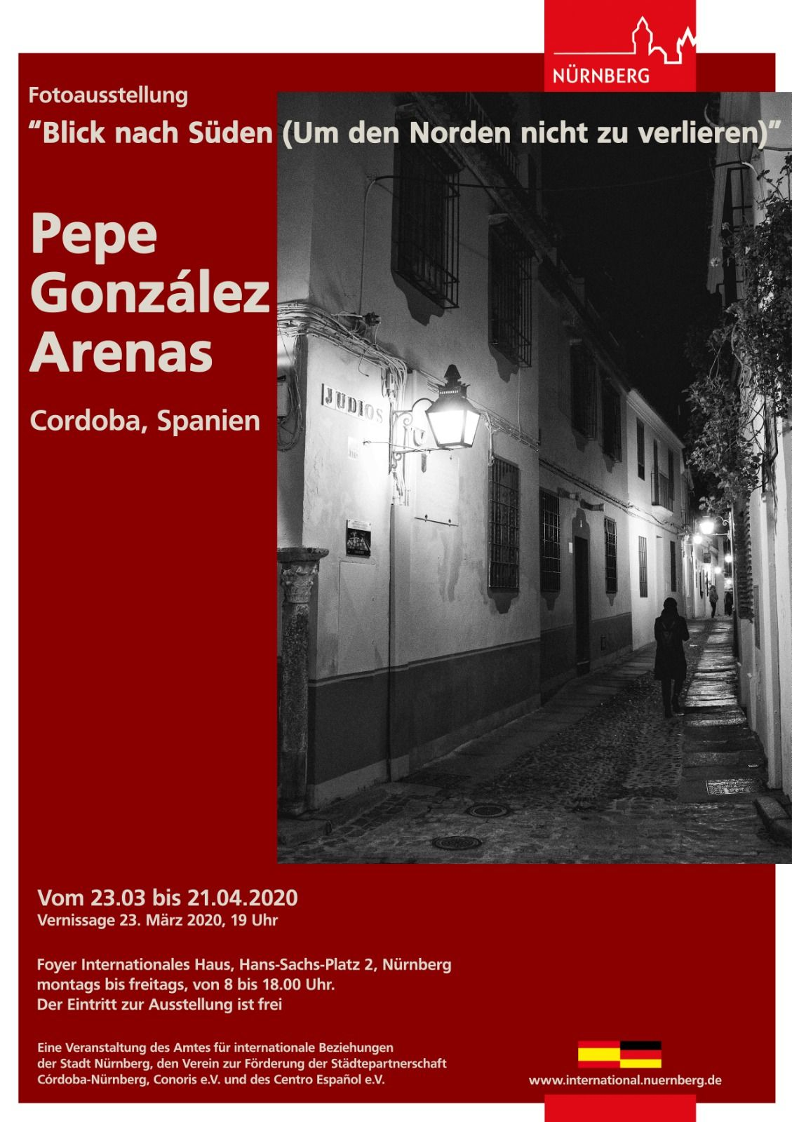 Cartel promocional de la Exposición de fotografías del artista español Pepe González Arenas, realizada en Núremberg, Alemania, del 23 de marzo al 21 de abril del 2020